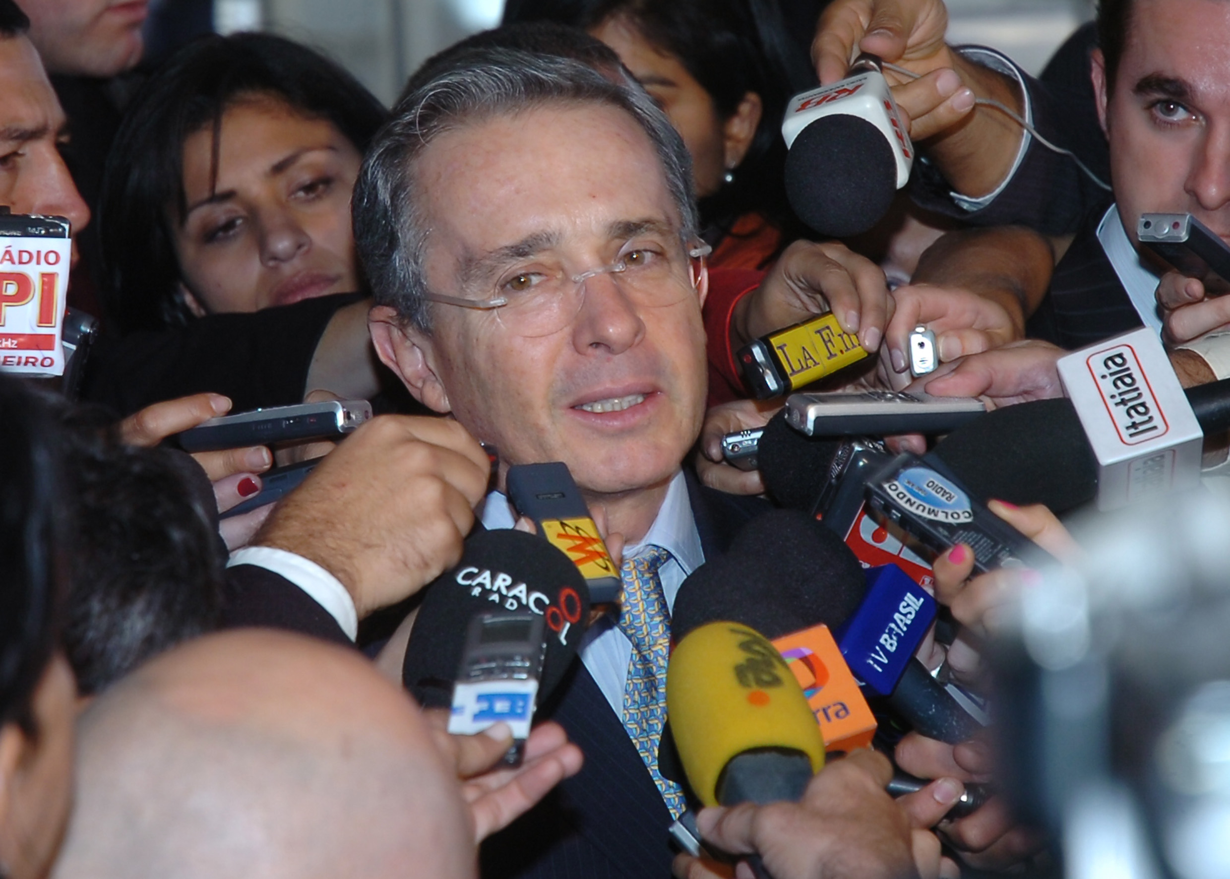 (Brasília) - Presidente da Colômbia, Álvaro Uribe, dá entrevista depois da reunião da União de Nações Sul-Americanas.